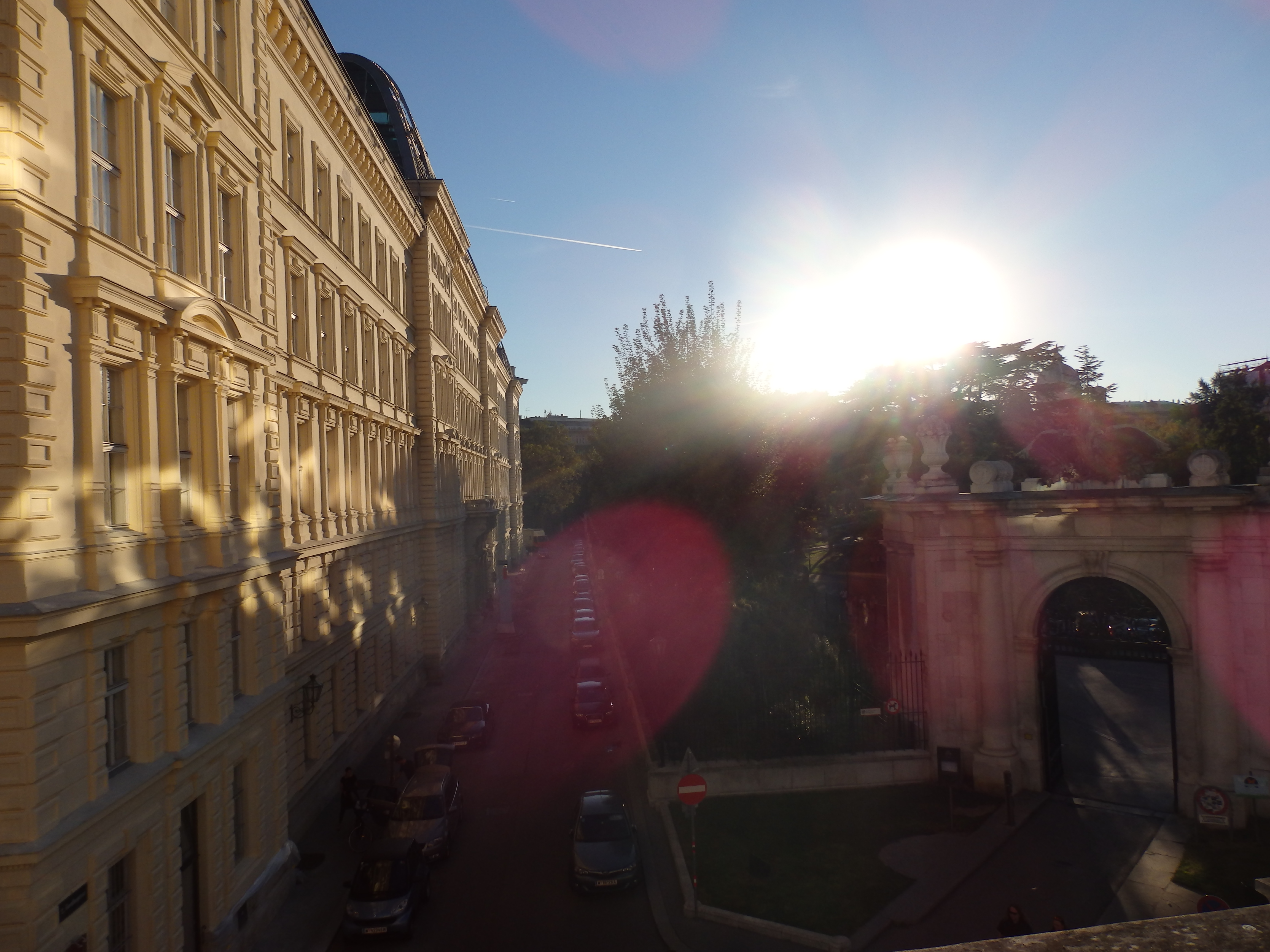 Goethegasse von der Augustinerbastei aus gesehen, Wien-Innere Stadt